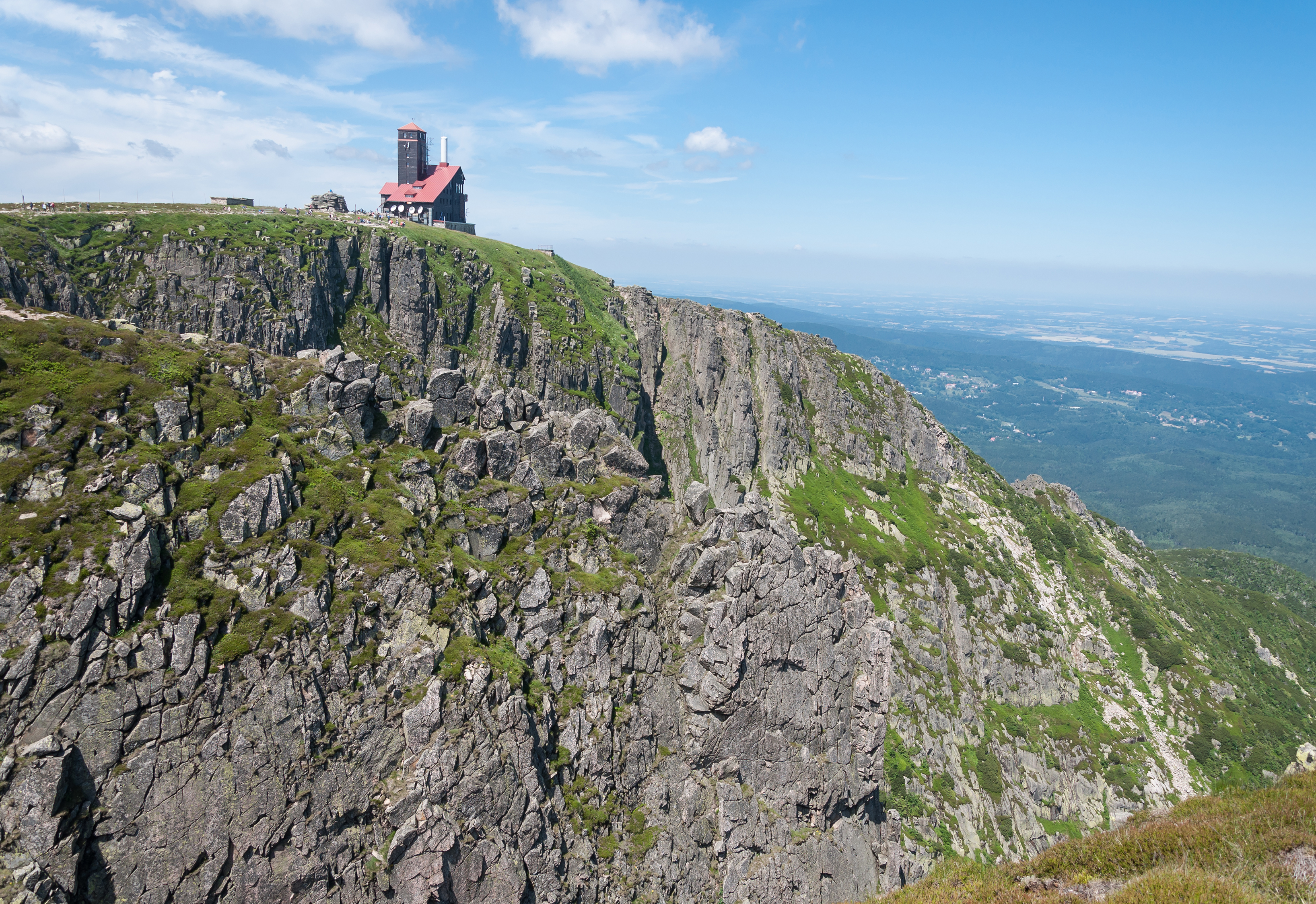 Park narodowy: Karkonoski Park Narodowy. Ośrodek nadawczy w Śnieżnych Kotłach This is a photography of protected area with CRFOP ID PL.ZIPOP.1393.PN.11